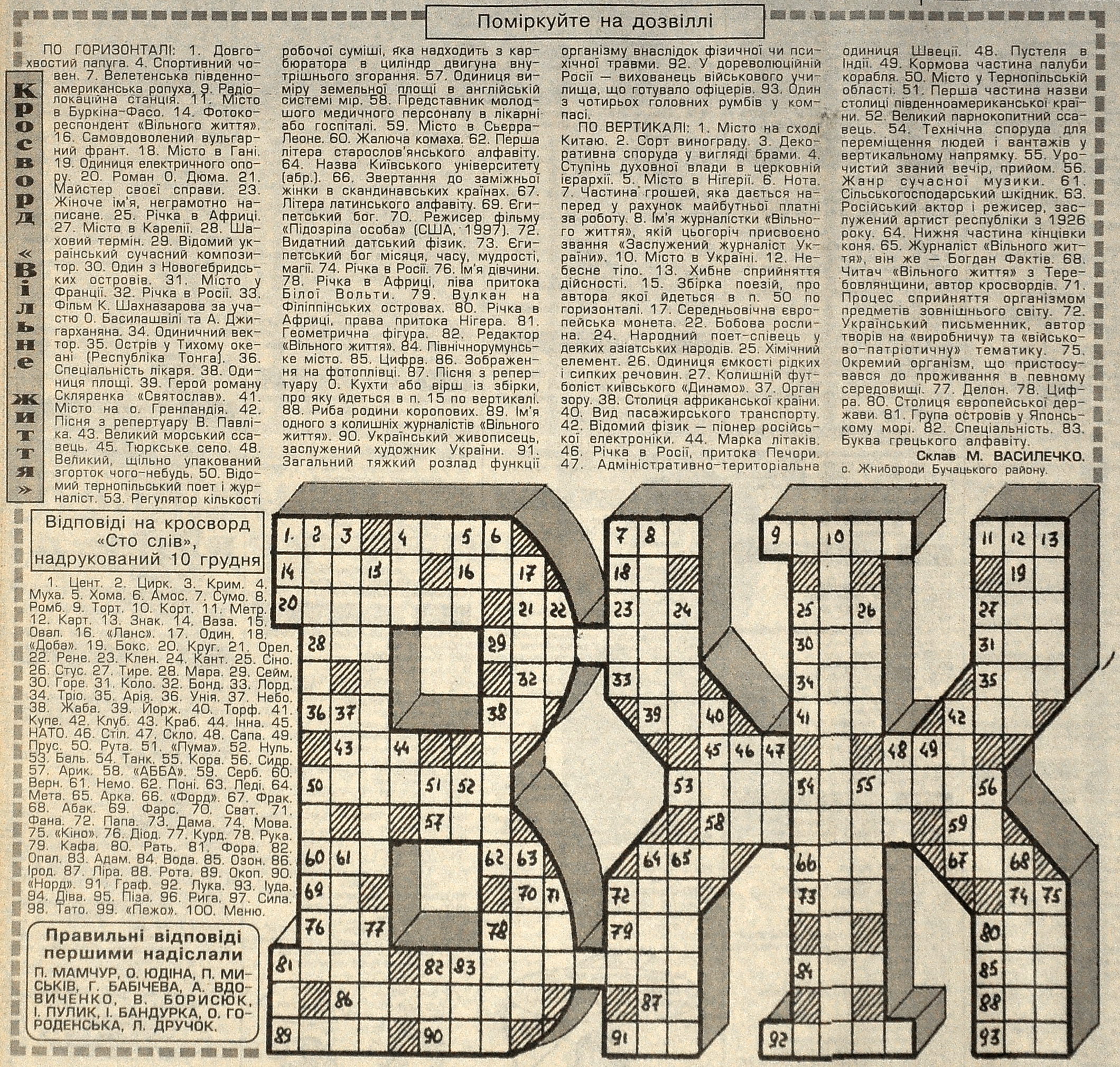 Класичний кросворд Миколи Василечка «Вільне життя» надрукований у газеті «Вільне життя», № 149 від 24 грудня 1998 року.